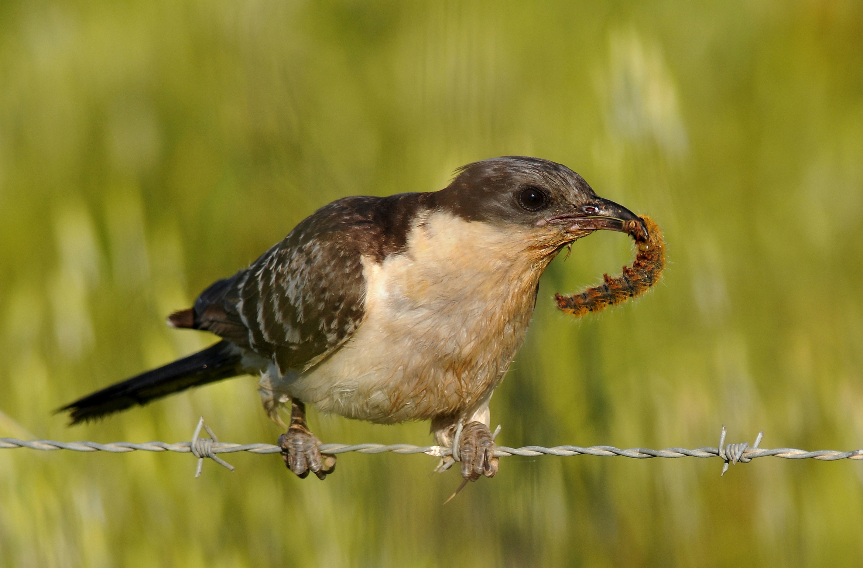 Foto tirada na zona da Ponta da Erva - Vila Franda de Xira